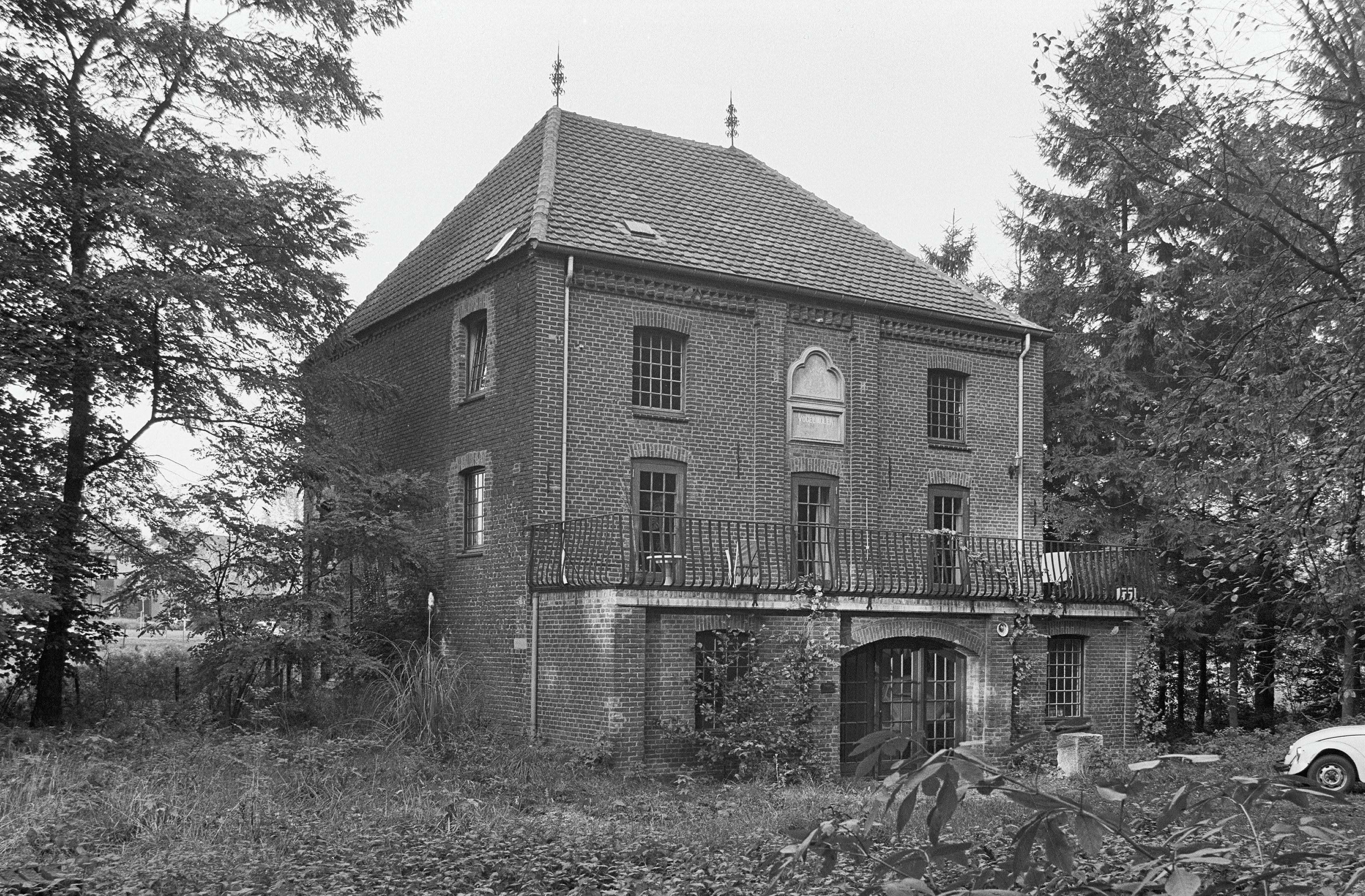 voorzijde "Vogelmolen"